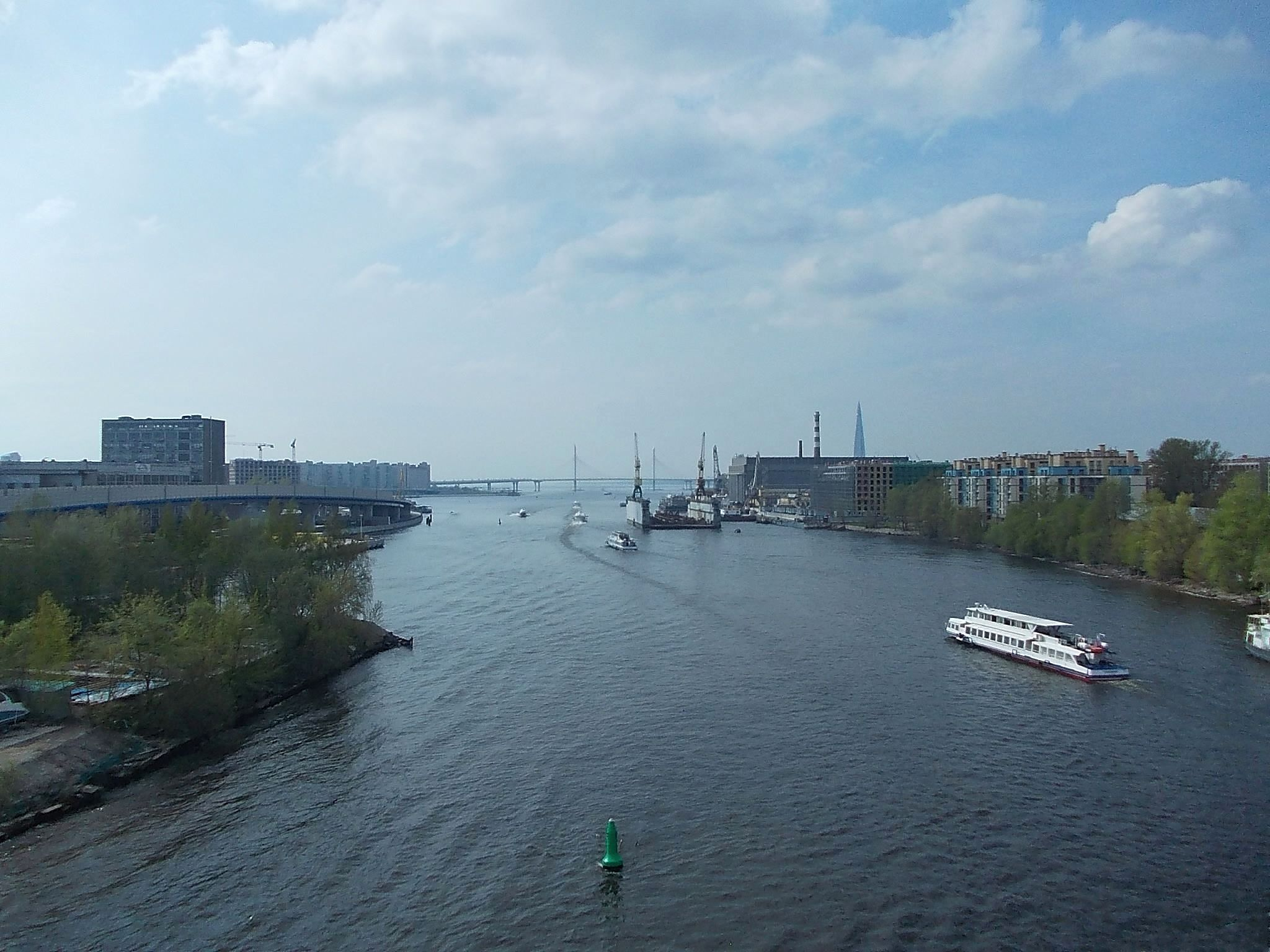 Вид с моста в сторону Финского залива